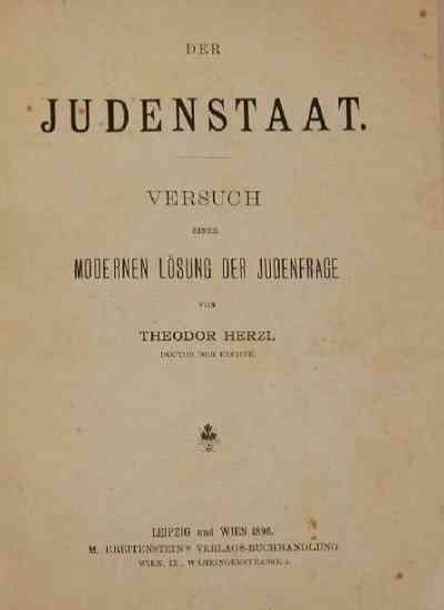 Cover of Theodor Herzl's (1860-1904) Judenstaat.